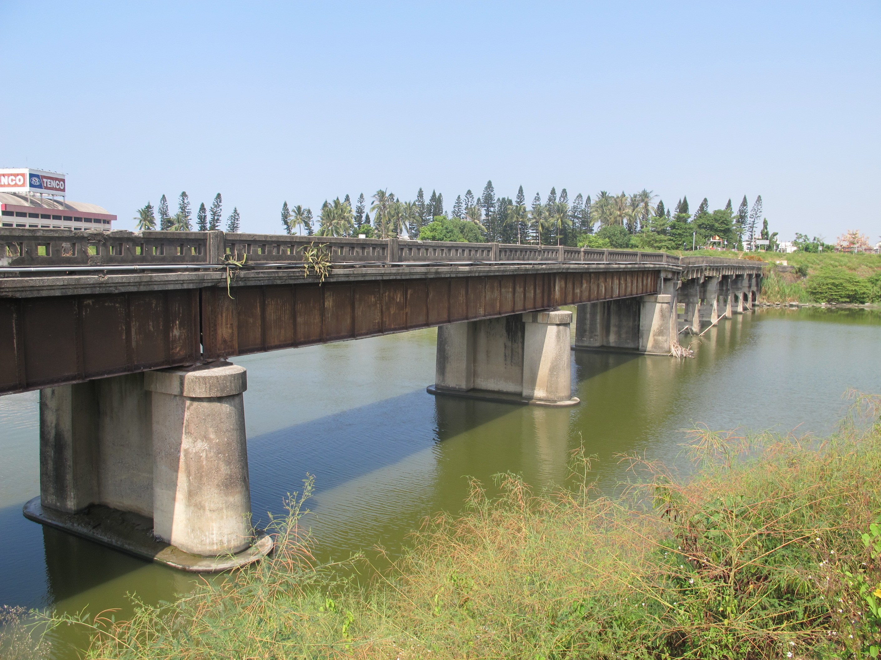 二層行橋南岸橋墩